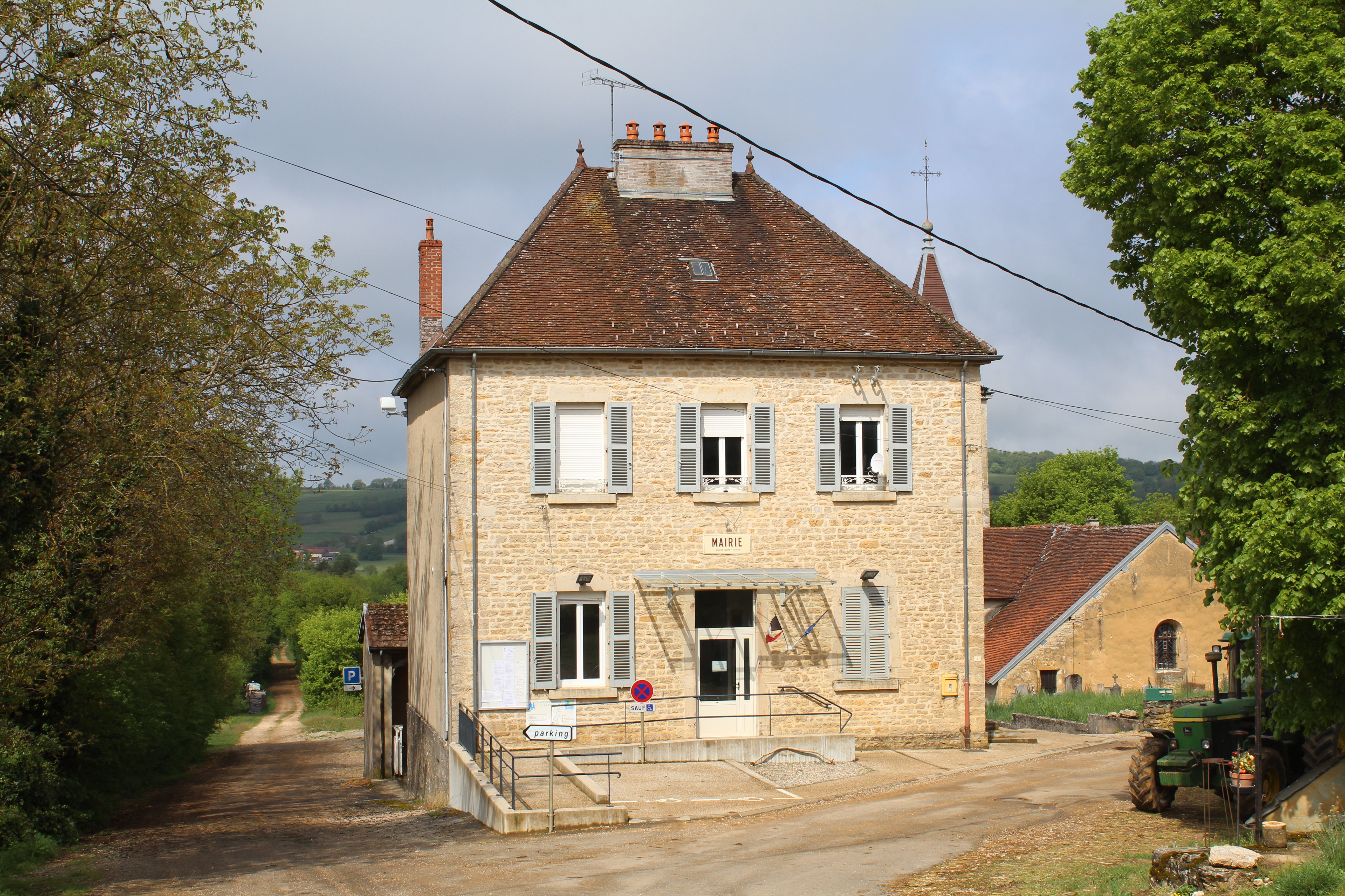 Mairie de Rosay, Jura.